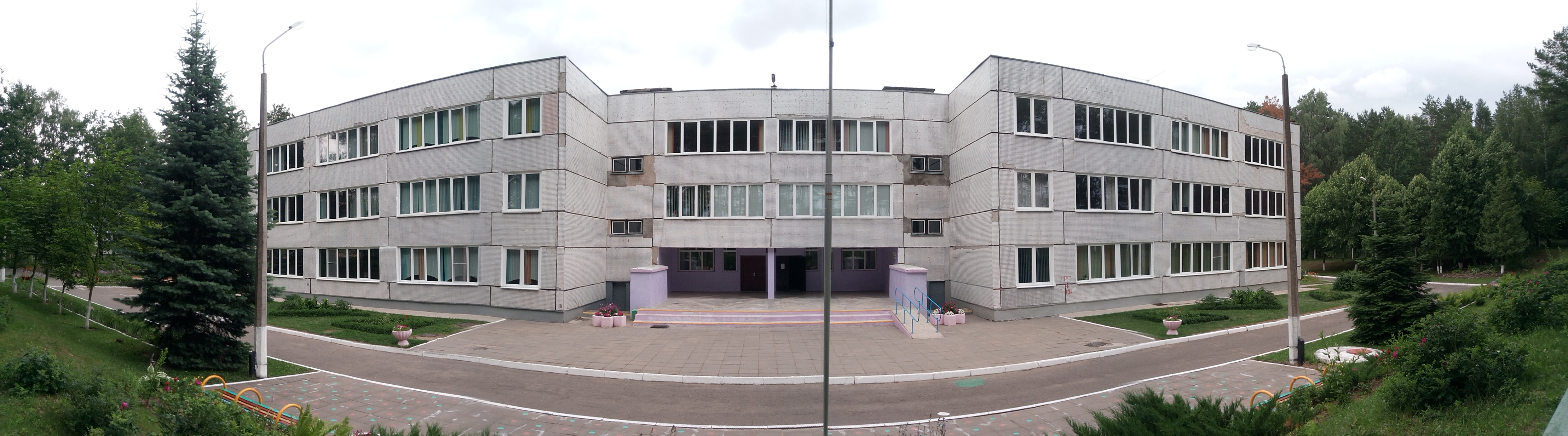 Свіслацкая школа імя А. Р. Чарвякова